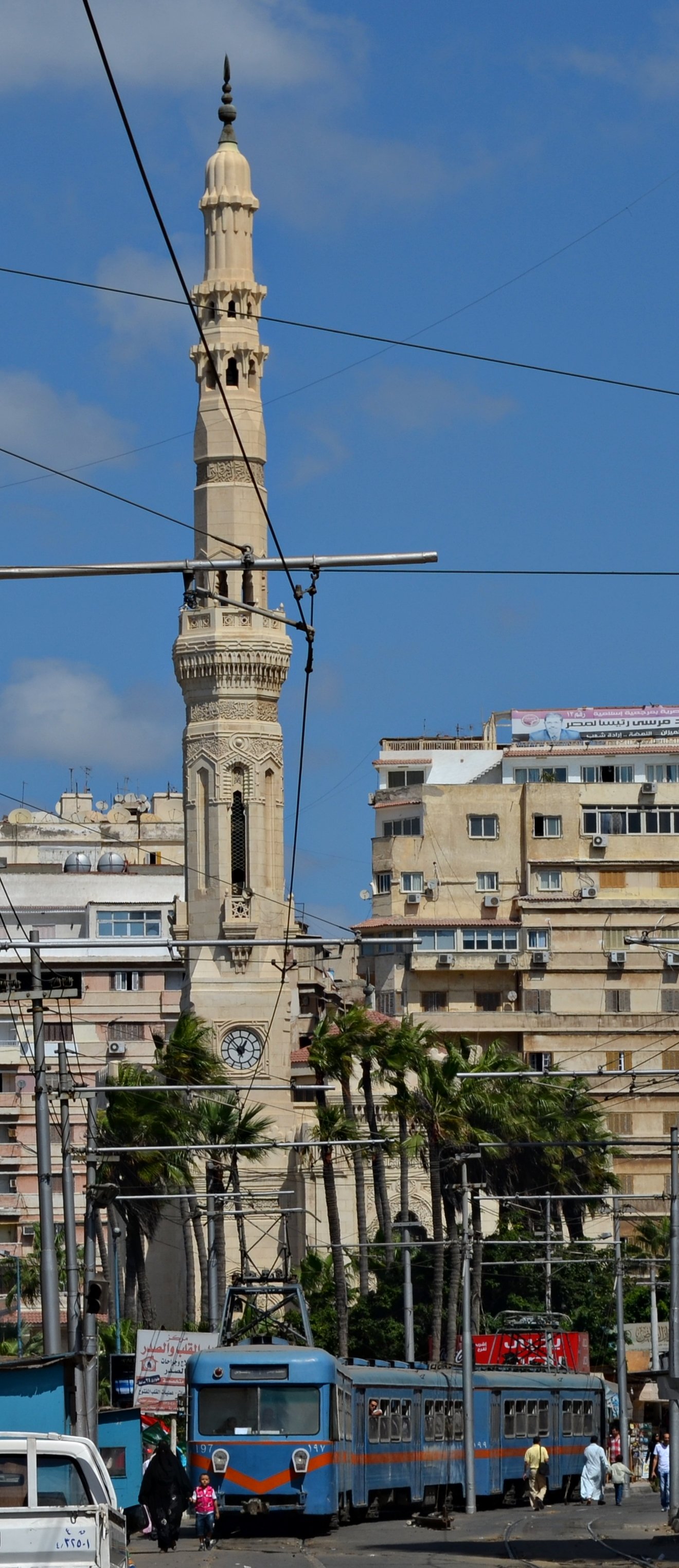 مسجد القائد إبراهيم ويمر بجانبه الترام، الإسكندرية